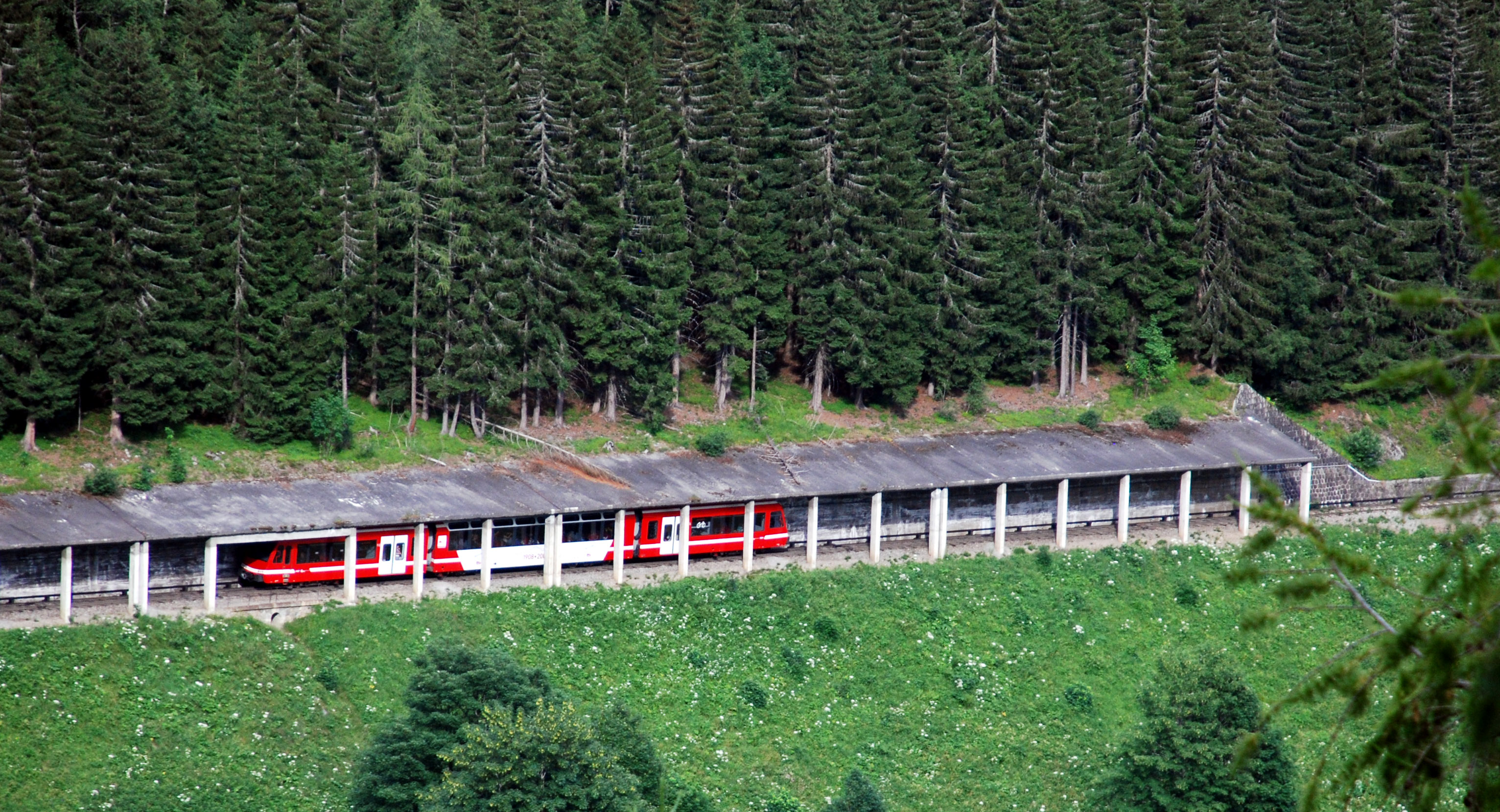 Z850 dans un paravalanche entre Argentière et Montroc.